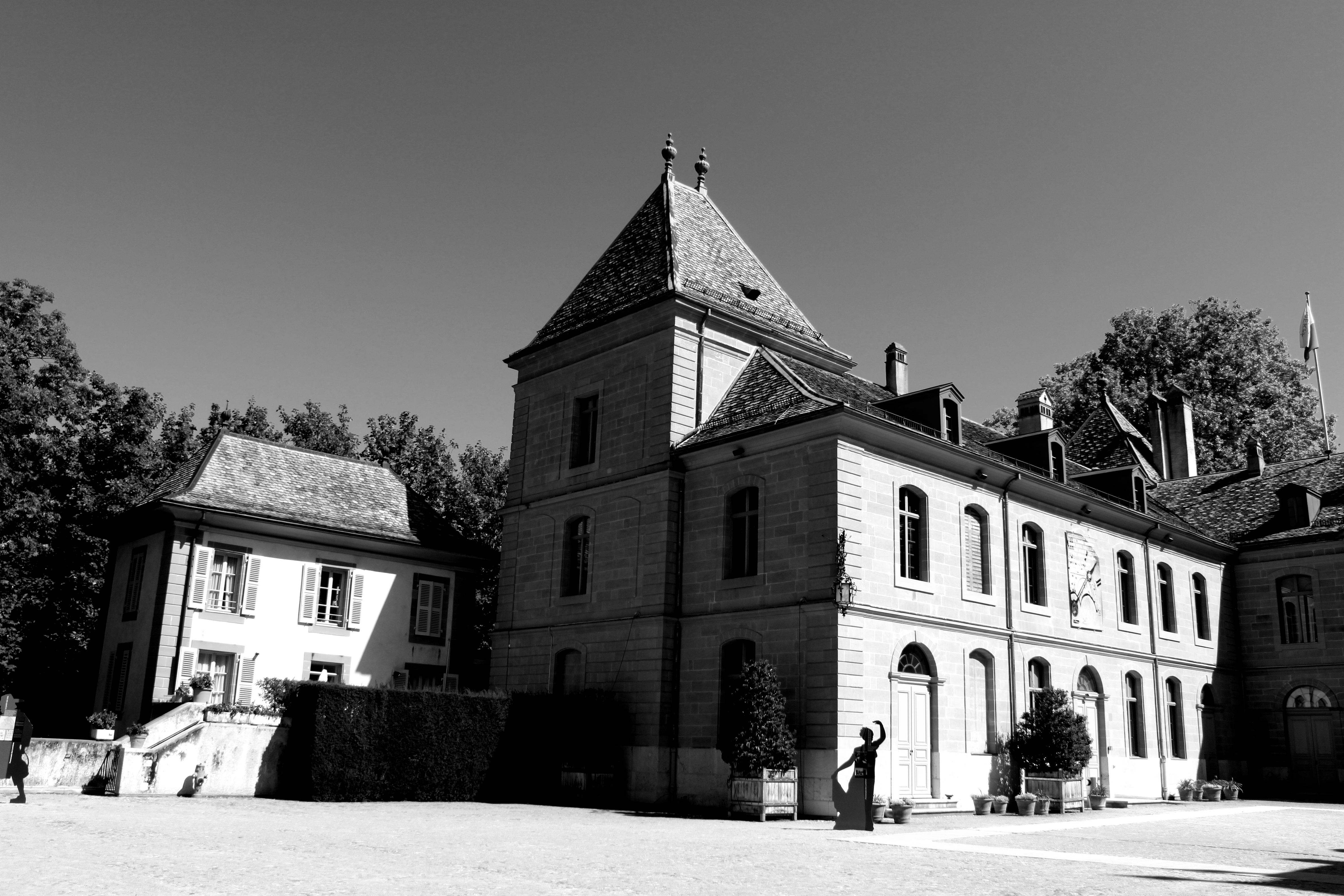 Suisse, canton de Vaud, Château de Prangins.